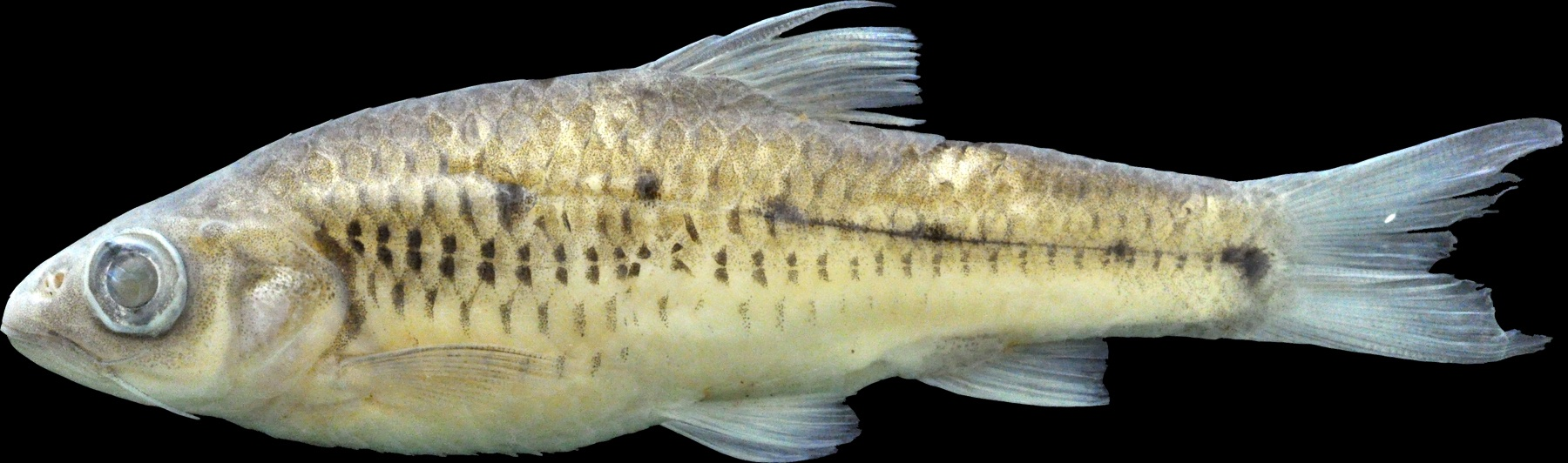 Barbus_cadenati_AUM59519_51.2mmL